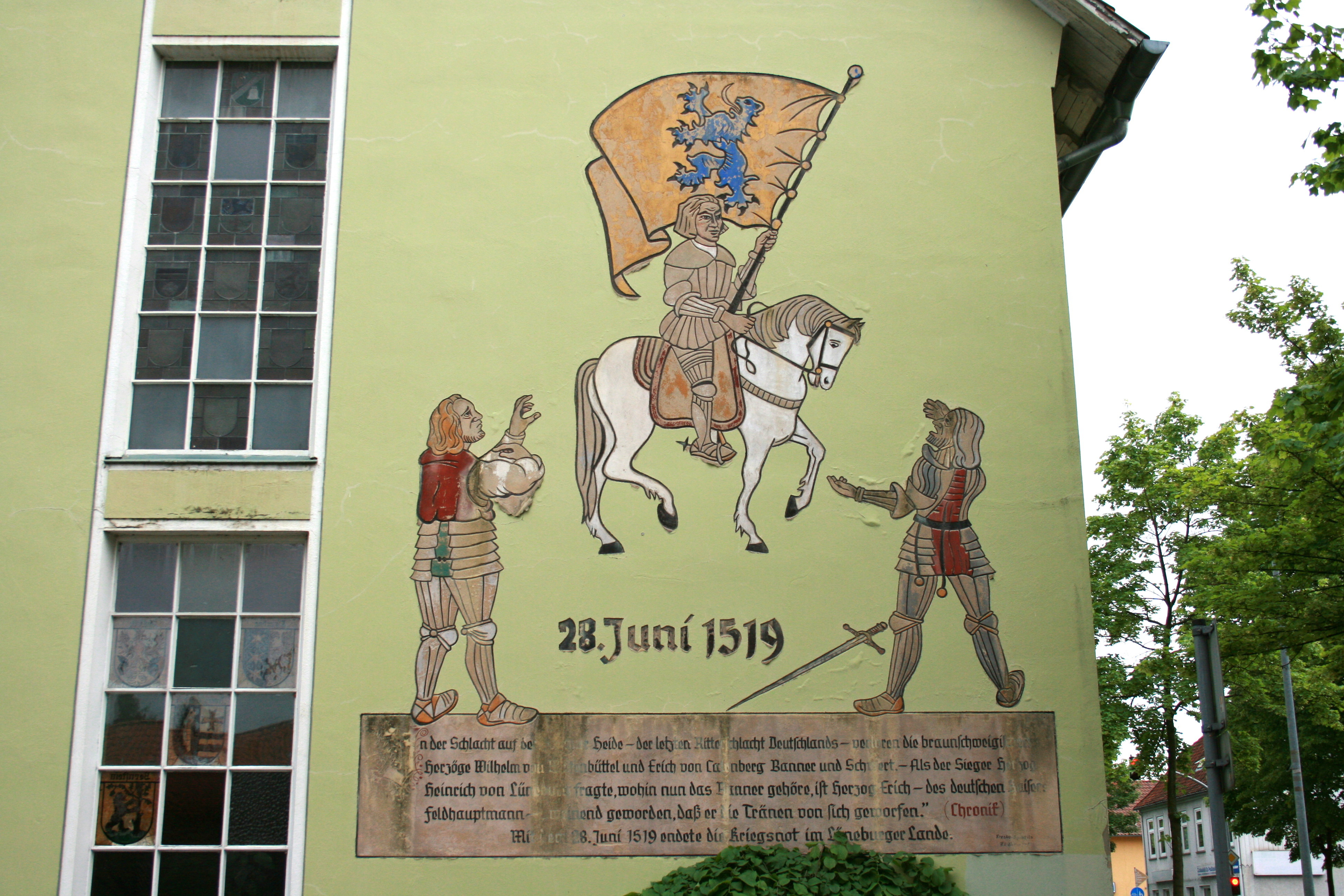 Kreisverwaltung, Harburger Straße in Soltau